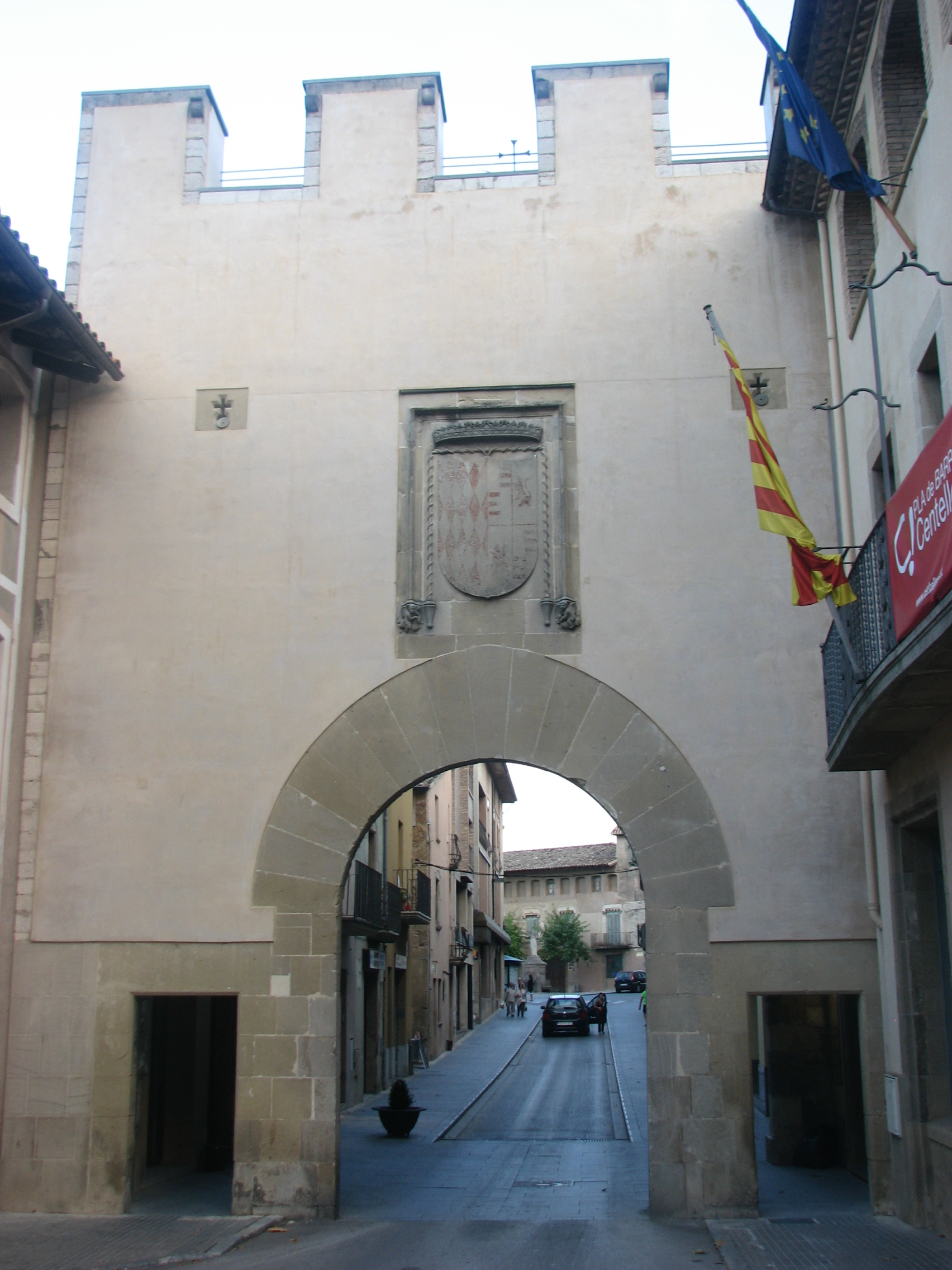 El Portal (Centelles) vist des de l'exterior